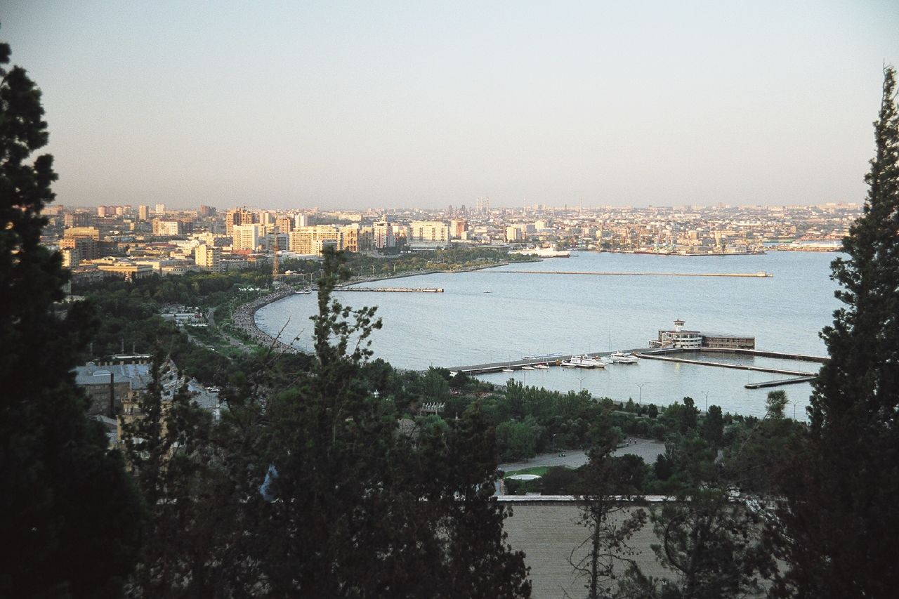 Baku, Azerbaiginan